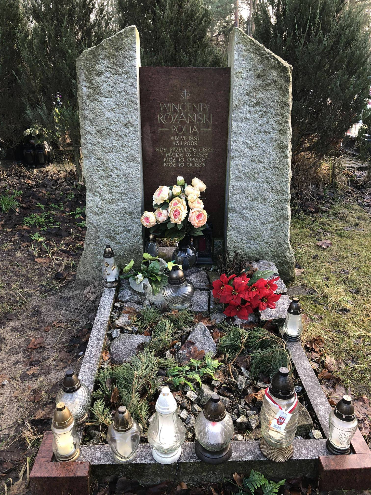 Wykonane 6 stycznia 2018 roku